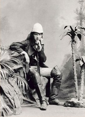 Чешский ботаник, путешественник, первооткрыватель десятков видов кактусов Альберт Фрич в студии неизвестного фотографа (Прага, 1901) после возвращения из своей первой экспедиции в Южную Америку. В кадре ему 19 лет. Фотография постановочная, изображает путешественника, как будто в самом деле сидит с ружьём, в саванне между бумажной пальмой сабаль и ватными драценами